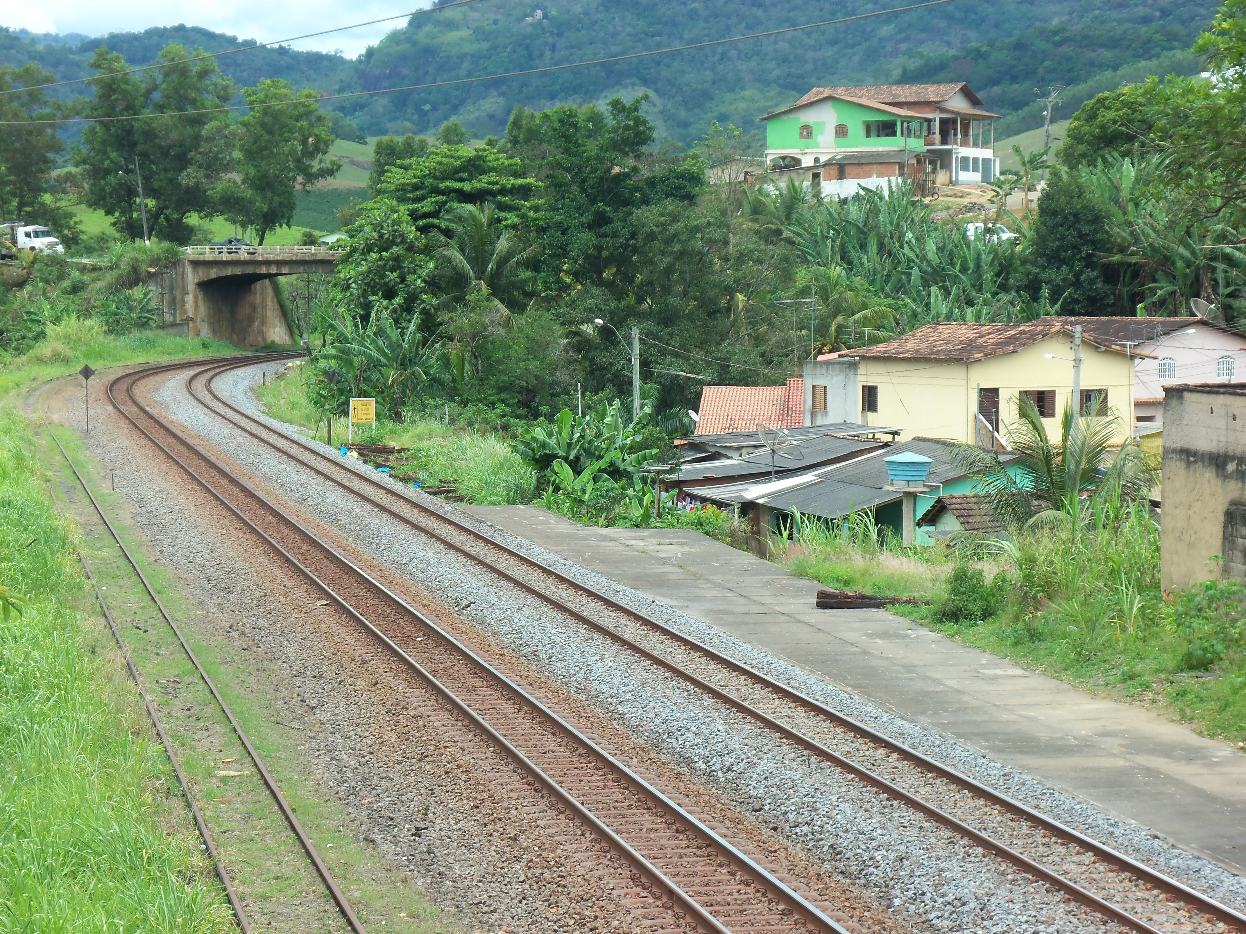 Estrada de Ferro Vitória a Minas em Fundão, Espírito Santo.